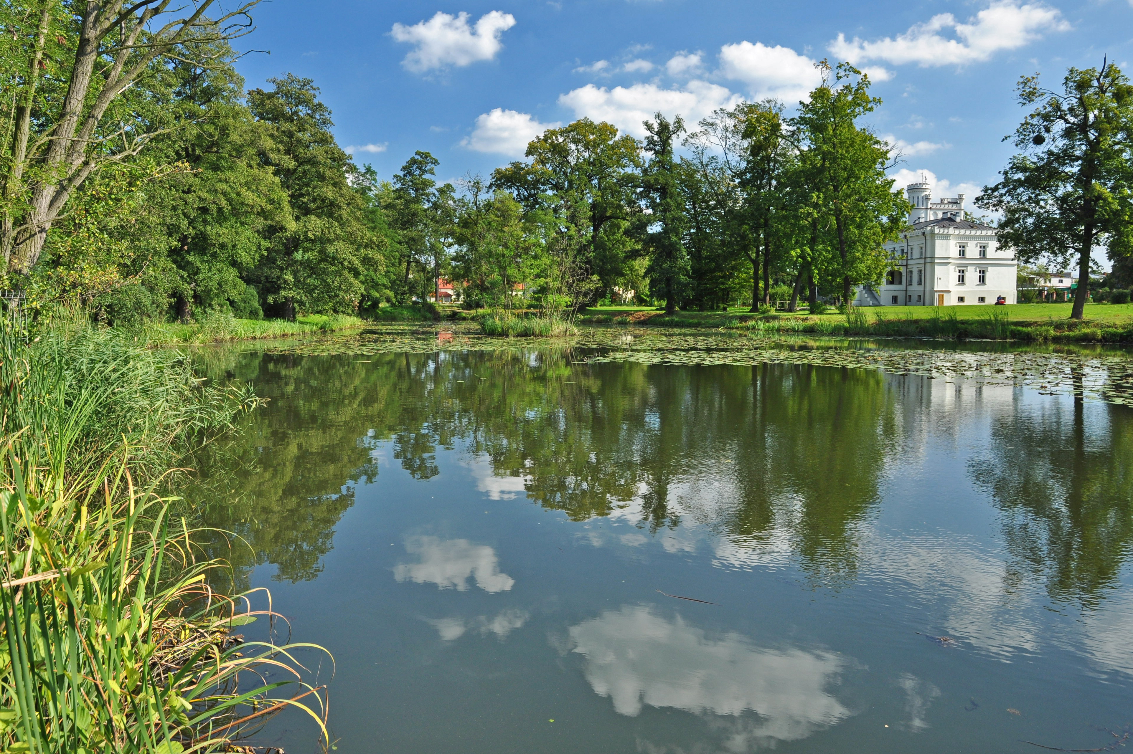 Park w Mrozowie, Mrozów